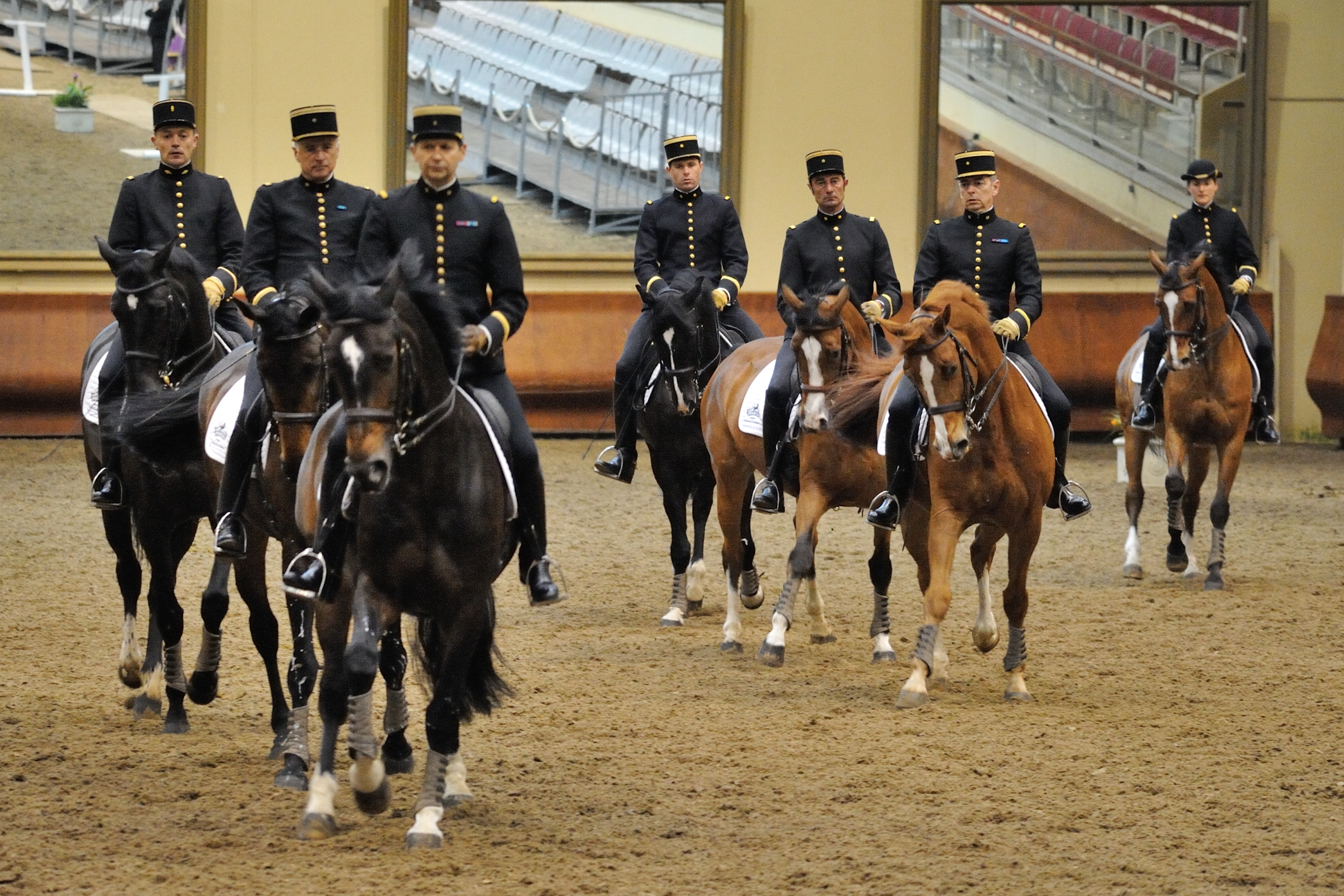 Présentation publique du Cadre noir, École nationale d'équitation, Saumur (description à compléter)